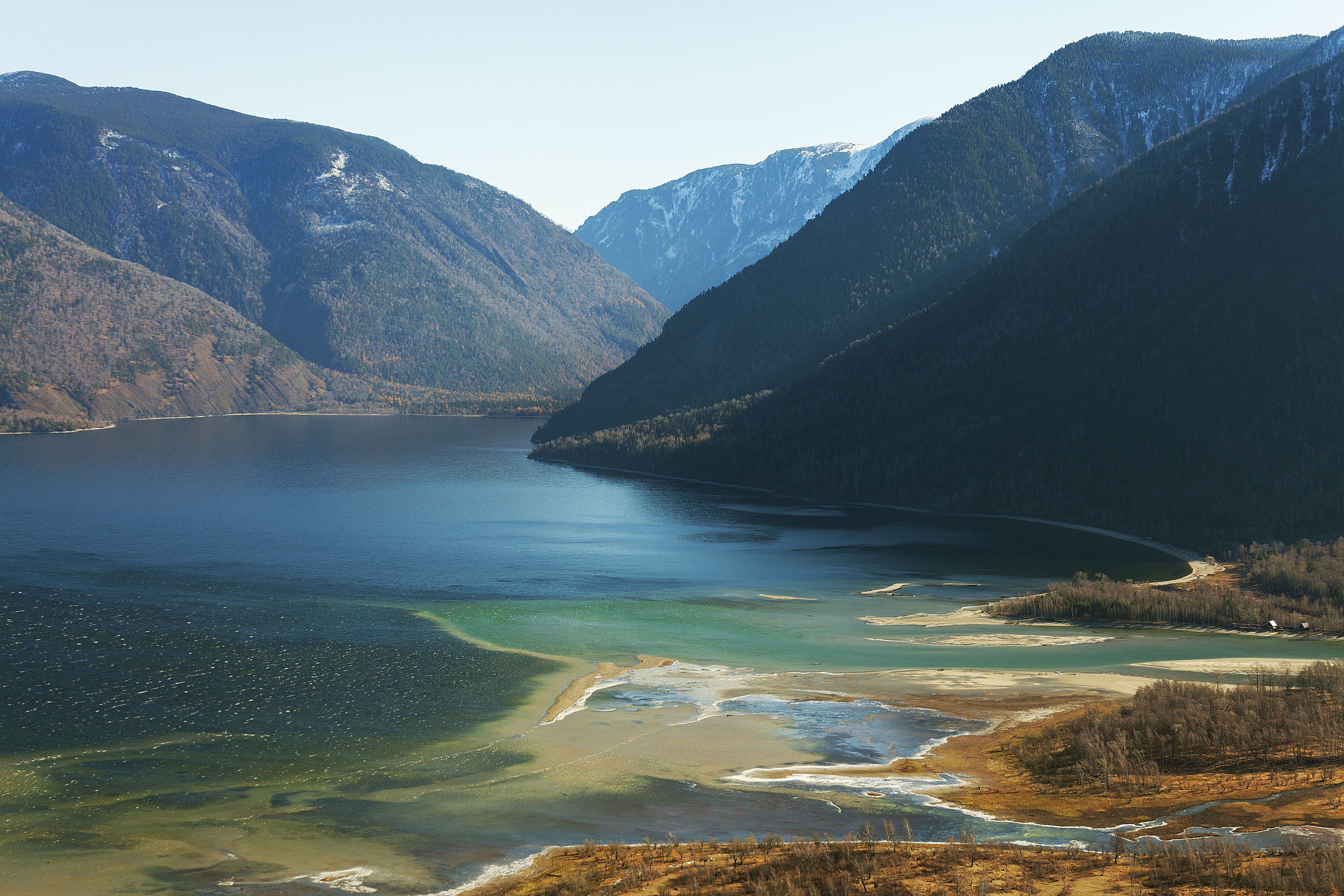 Телецкое озеро